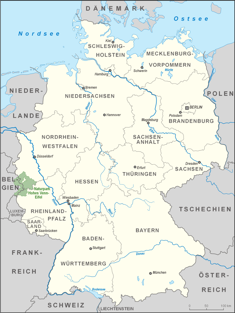 Karte des Naturparks Hohes Venn-Eifel in Deutschland und in Belgien